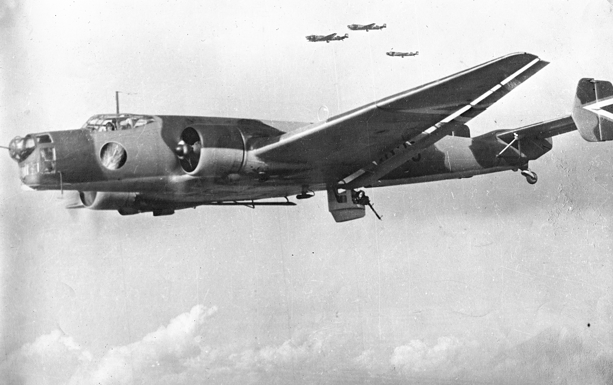 Junkers Ju-86 K-2 típusú repülőgépek. Tags: transport, vehicle, Royal Hungarian Air Force, airplane, Junkers-brand, military, Hungarian air force, Gerrman brand, weapon Title: Junkers Ju-86 K-2 típusú repülőgépek.